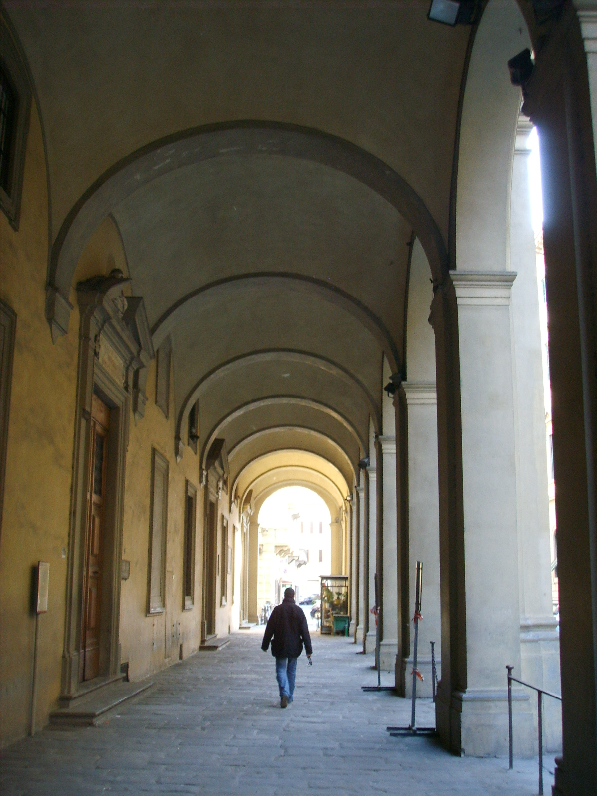 Ospedale bonifacio, loggia